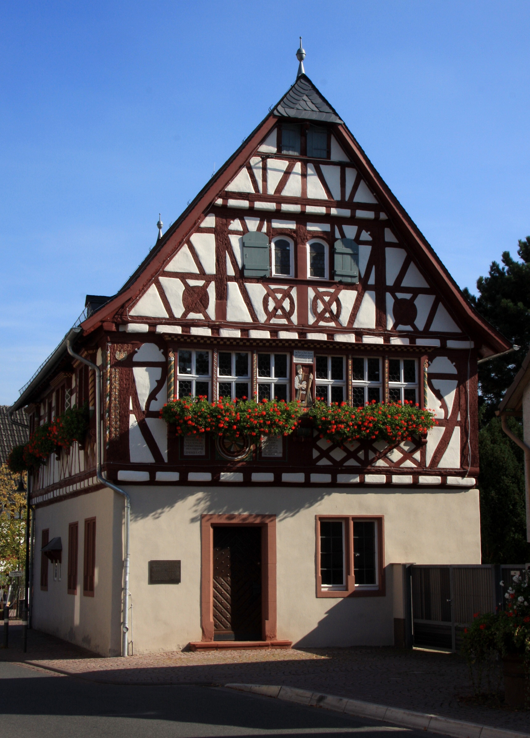 Rathaus Buettelborn